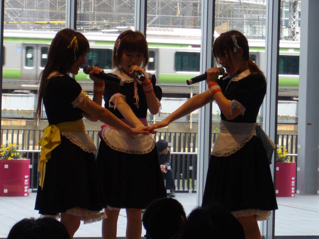 Tagalog: kuha ko ng bandang MUH~ sa isa sa mga live nilang pagtatanghal